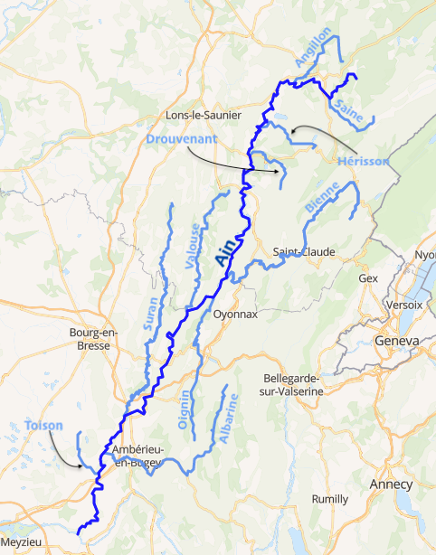 carte réalisée sur umap This map may be incomplete, and may contain errors. Don't rely solely on it for navigation.